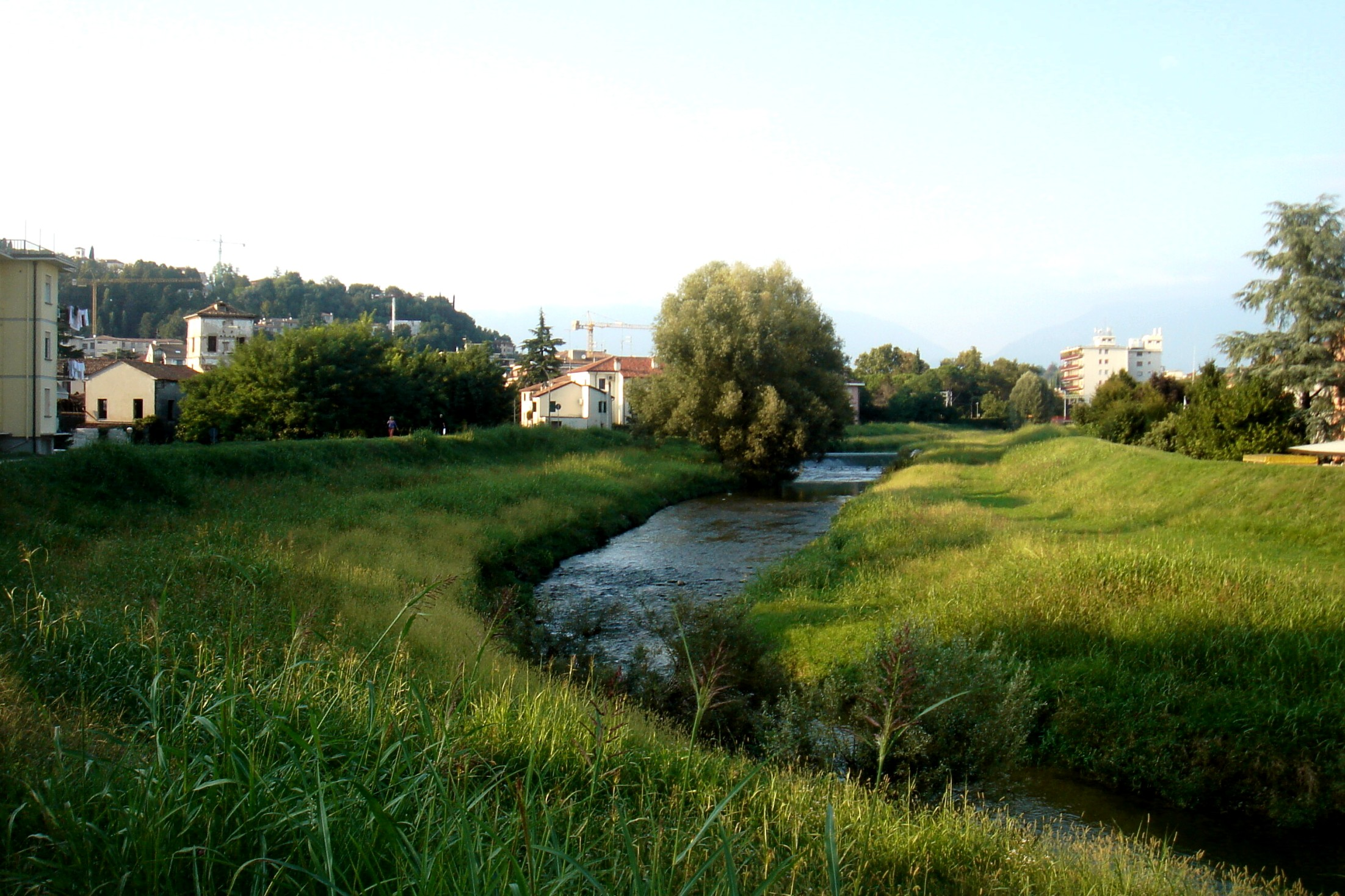 Conegliano (Treviso): il fiume Monticano dal ponte degli Zoppas.